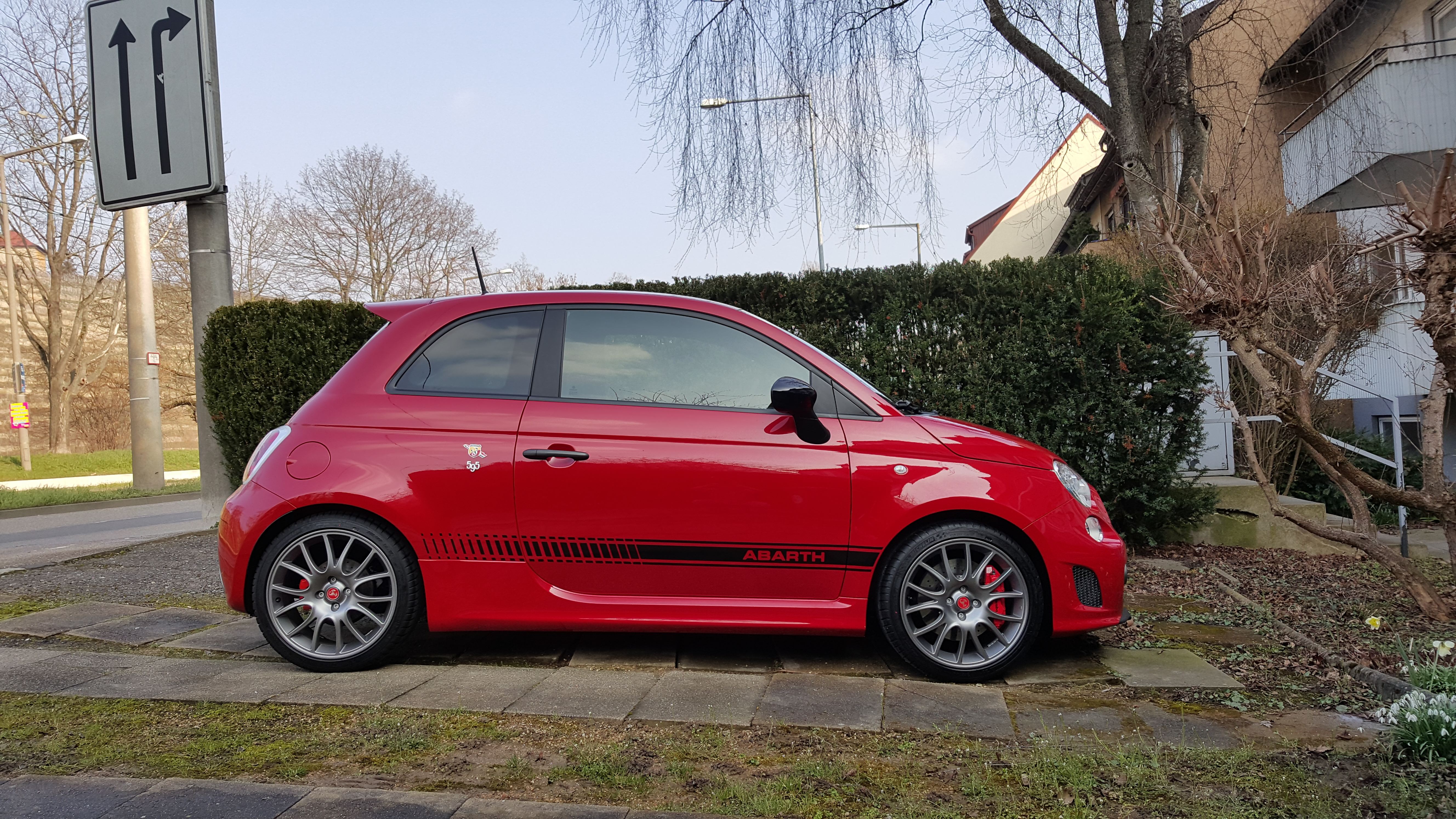 Rosso Tristrato (Cordolo Rot)